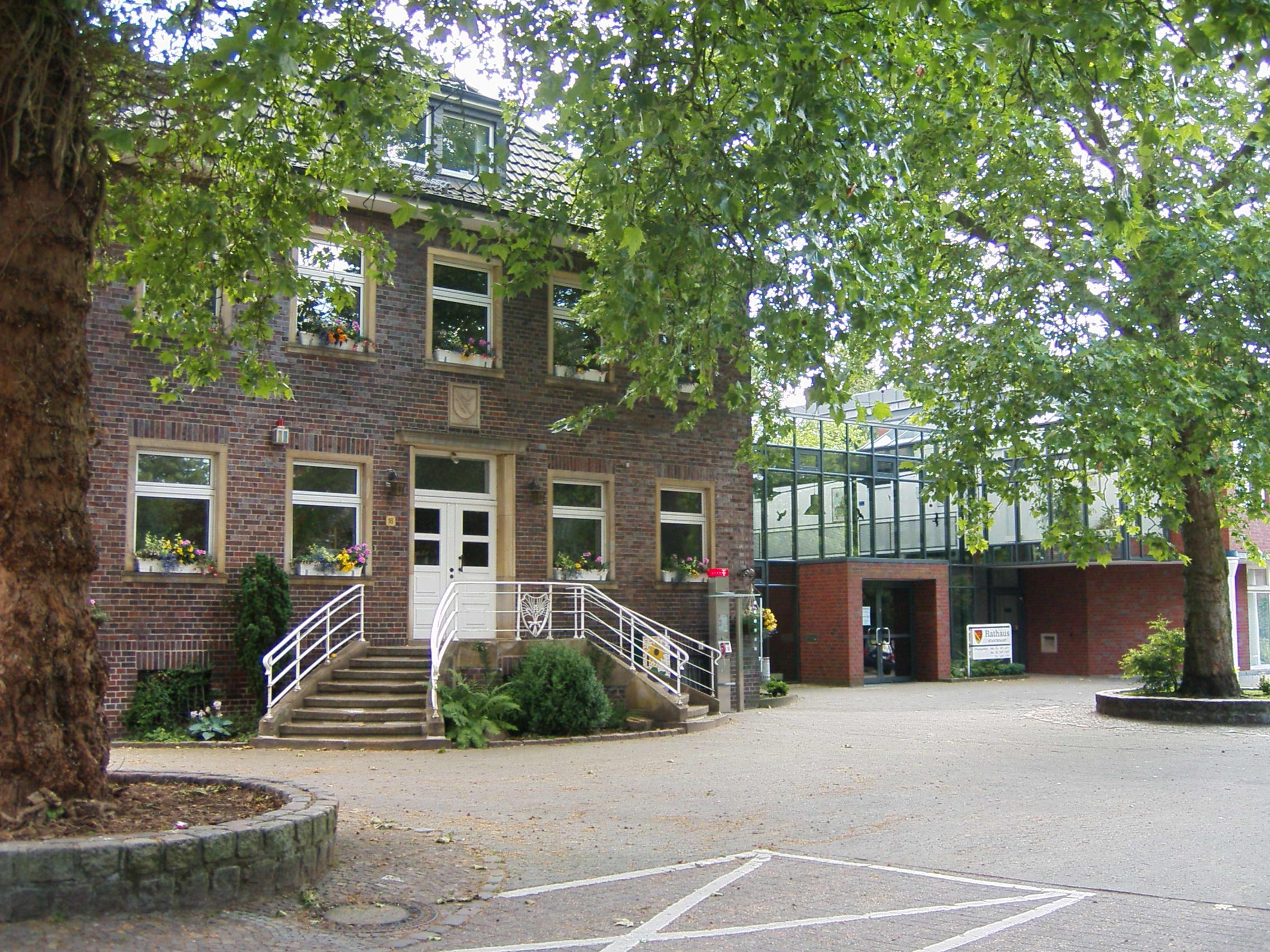 Rathaus in Neuenkirchen. Vorderansicht des Rathaus in Neuenkirchen (Kreis Steinfurt). Links der Altbauteil, dahinter der angebaute neue Erweiterungsbau.